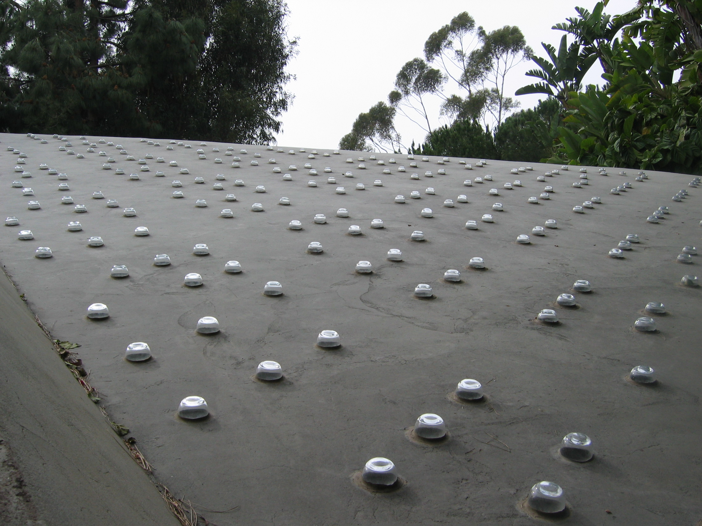 John Lautner's drinking glass skylights @ Goldstein residence - Los Angeles.